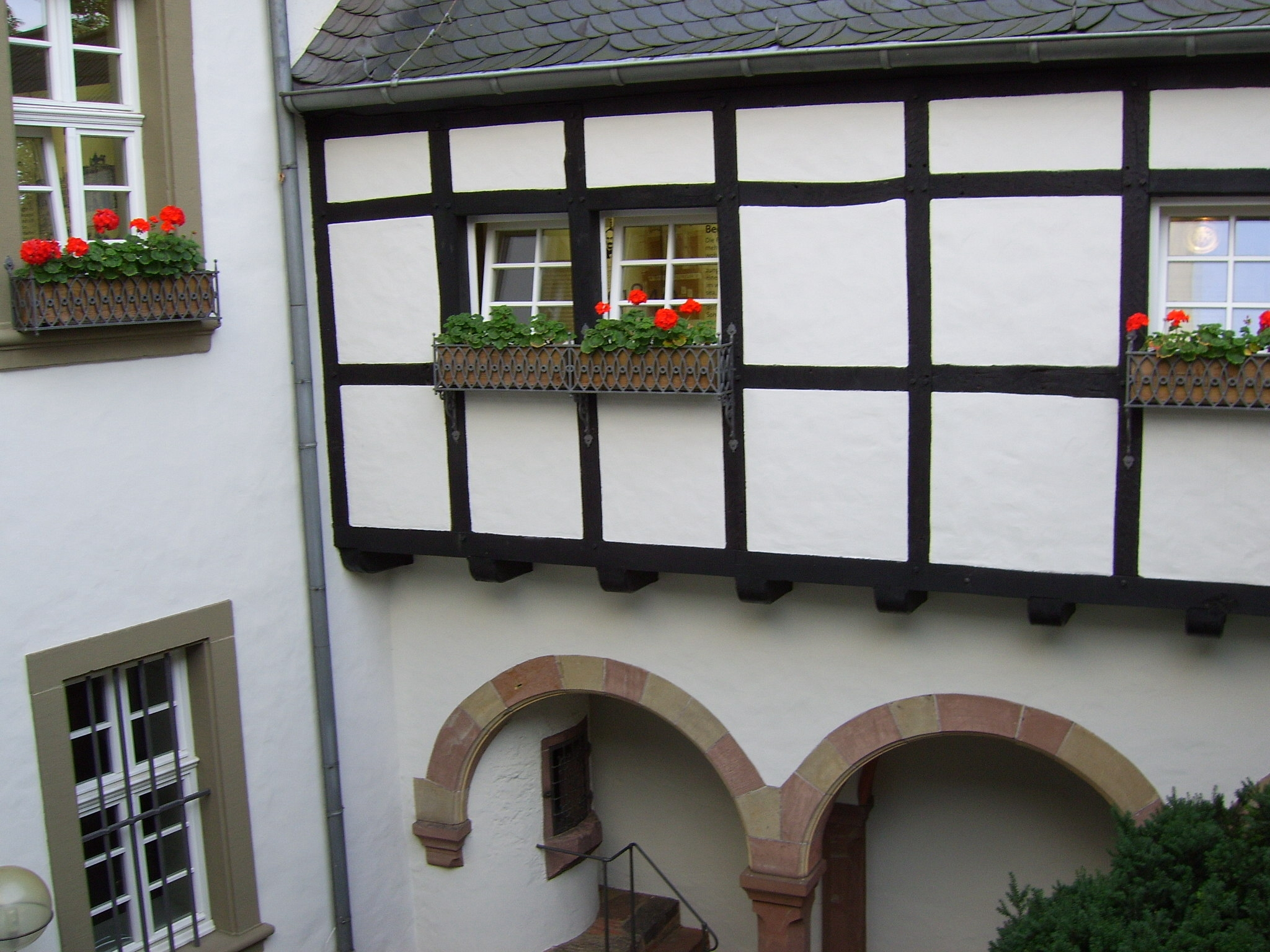 Karl-Marx-Haus Trier, Geburtshaus und Museum, Author: Anima, Samsung Digimax 700